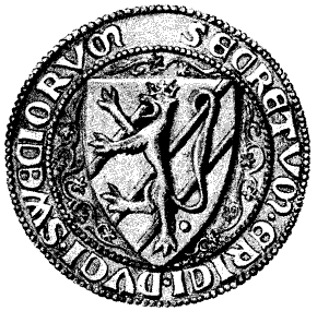 Erik Magnussons sekret